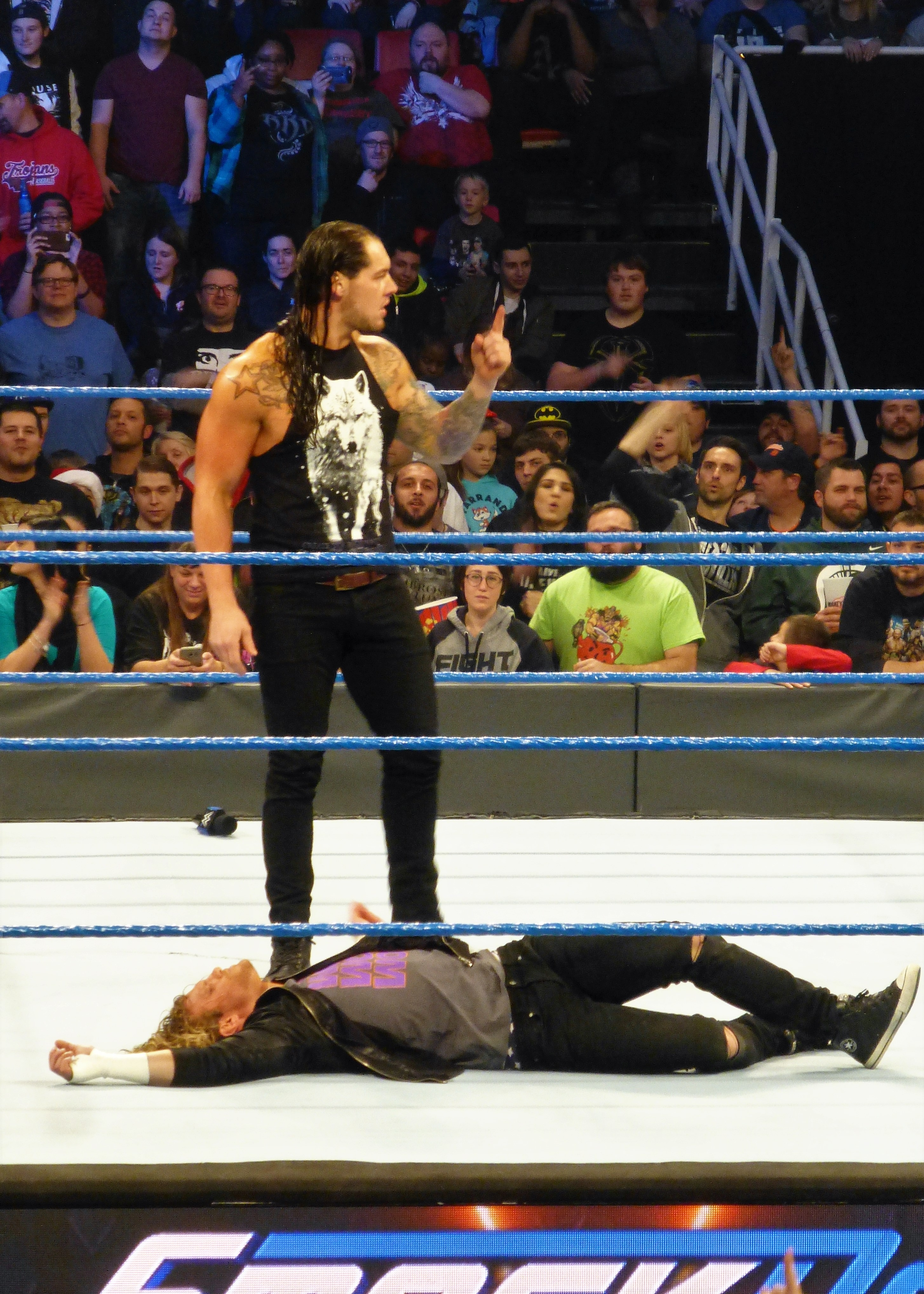 Baron Corbin and Dolph Ziggler